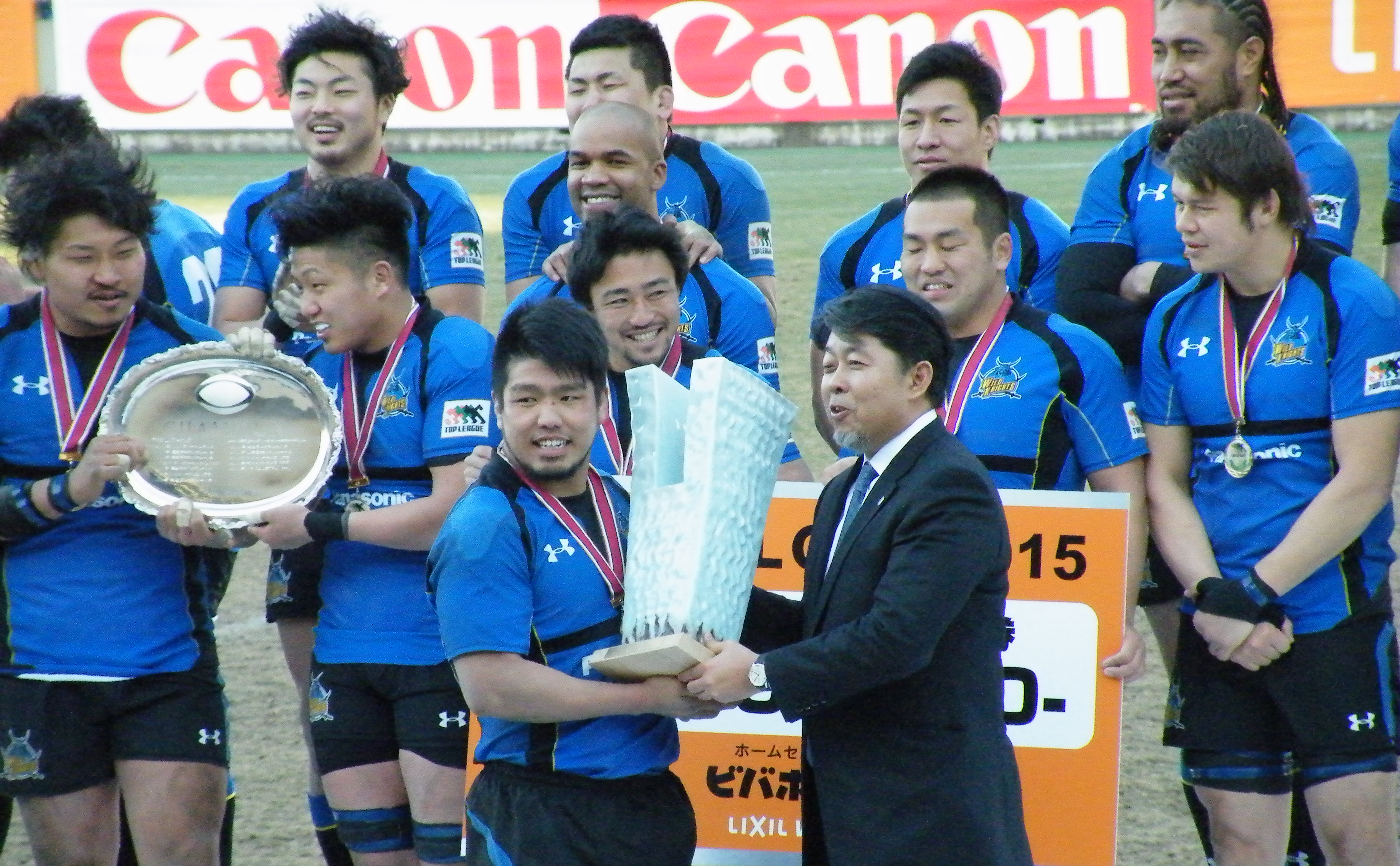 2014-2015シーズン最終戦 ヤマハ発動機対パナソニック。秩父宮ラグビー場